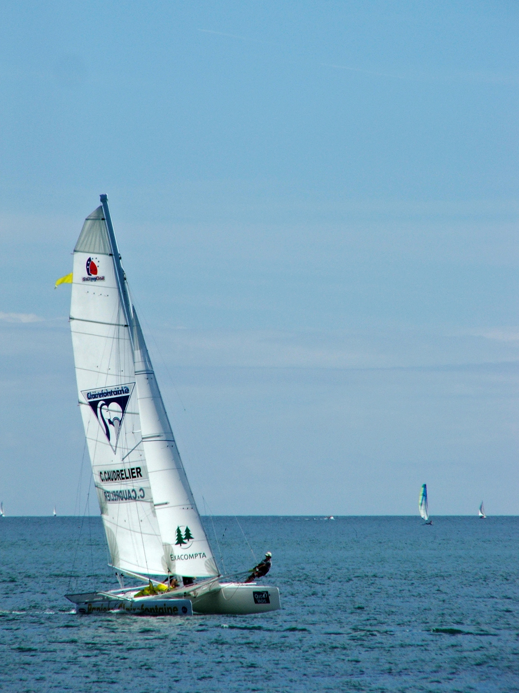 Trophée Clairefontaine des champions - La Trinité